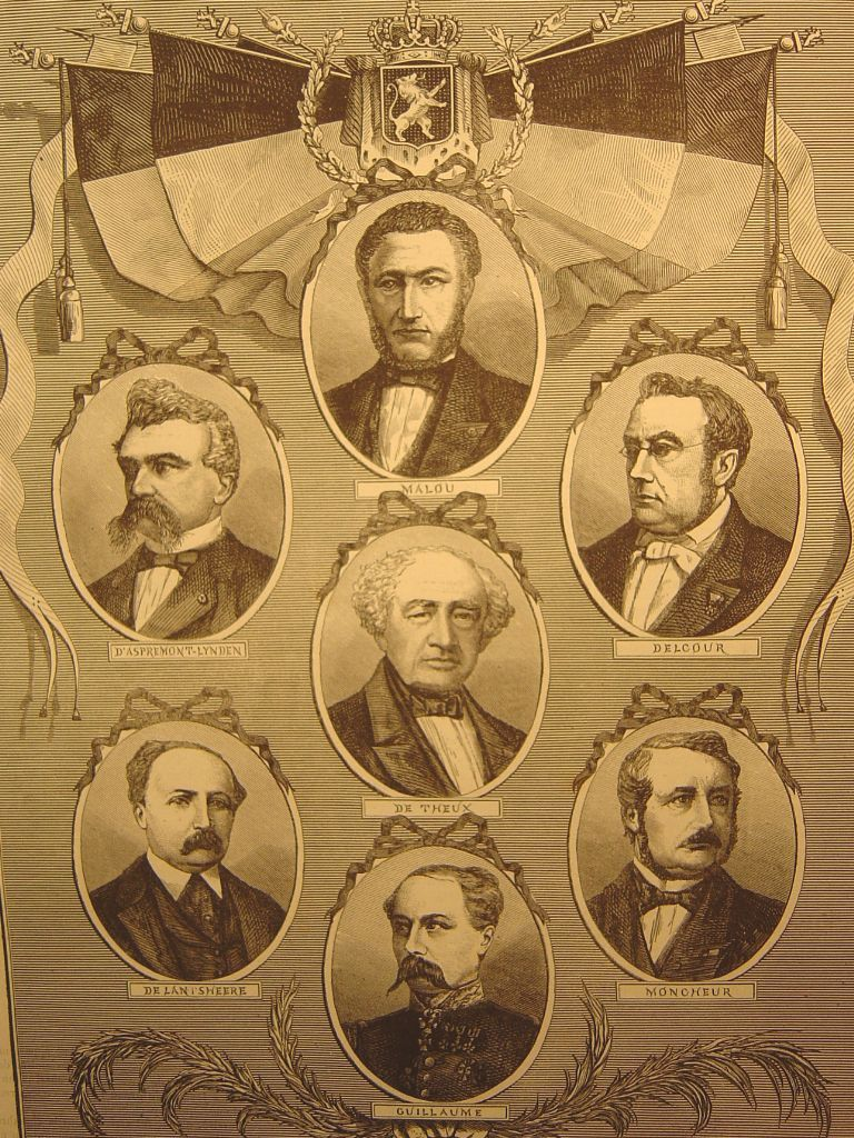 Les membres du gouvernement belge